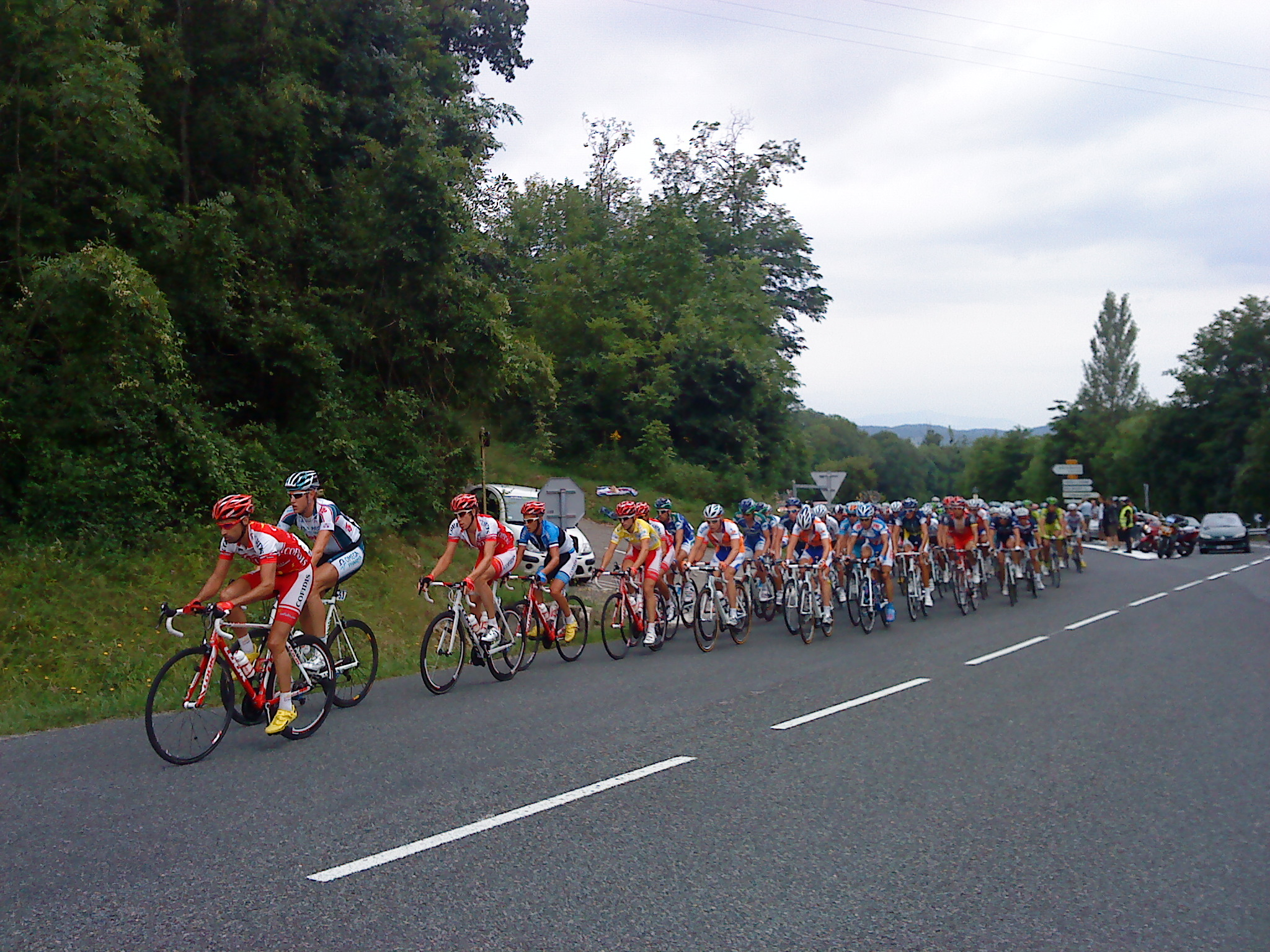 Le peloton emmené par l'équipe Cofidis dans le début de l'ascension du col du Grand Colombier